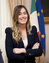 on. Maria Elena Boschi, Ministra senza portafoglio per le Riforme Costituzionali e i Rapporti con il Parlamento nel Governo Renzi.